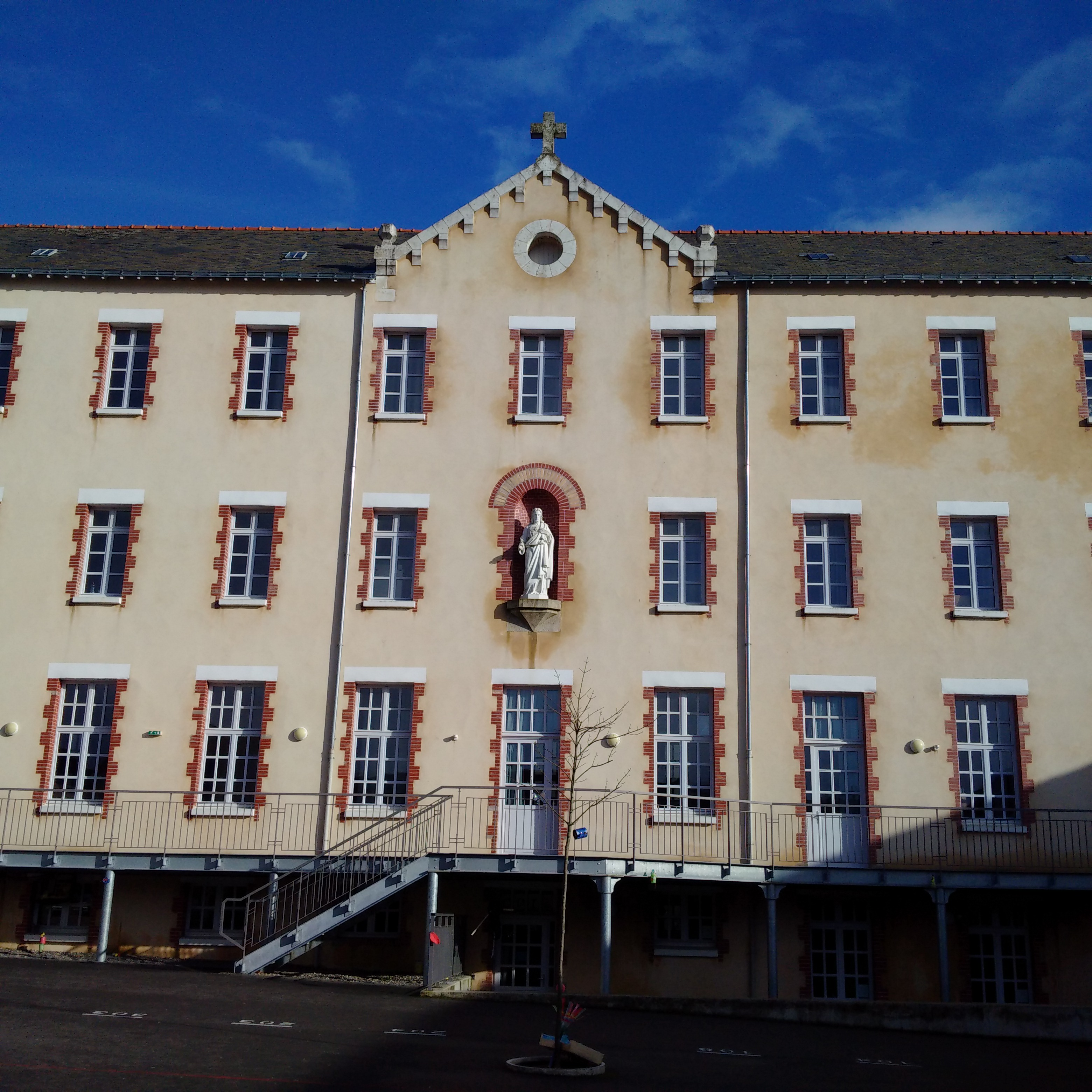 Skolaj ar C'hleuz e Redon, diouliet gant Yann-Vari De La Mennais